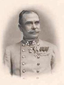 Hubert Freiherr von Czibulka (1842-1914), österreichischer Generalfeldzeugmeister, Vater des Schriftstellers Alfons von Czibulka